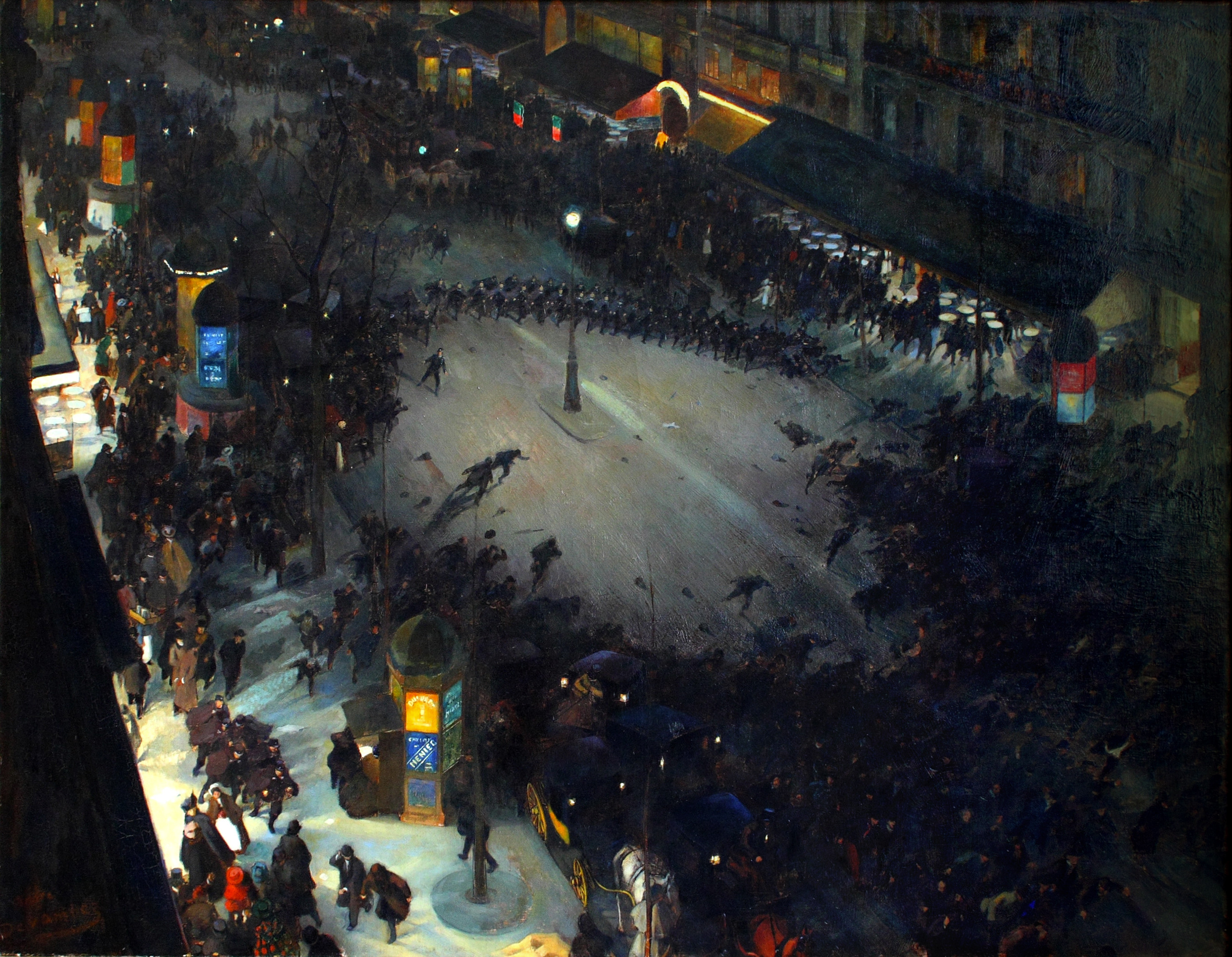 La Charge (1902/1903) - Tableau d'André Devambez (1867-1944) se trouvant au Musée d'Orsay à Paris.